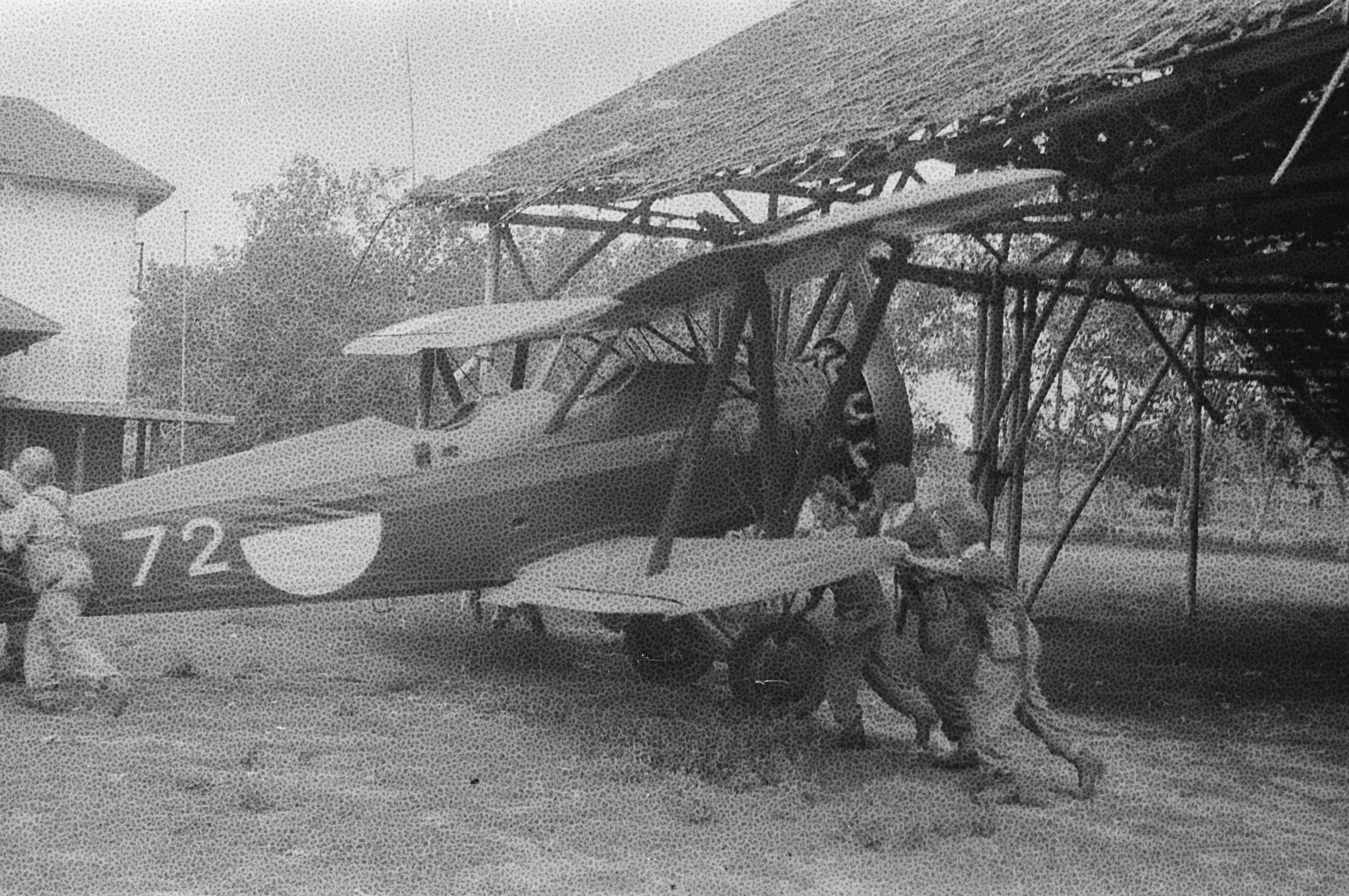 Collectie / Archief : Fotocollectie Dienst voor Legercontacten Indonesië Reportage / Serie : [DLC] Batavia op de eerste dag van de 2e politionele actie Beschrijving : Militairen rijden een verkenningsvliegtuig uit een hangar Datum : 19 december 1948 Locatie : Indonesië, Nederlands-Indië Fotograaf : Fotograaf Onbekend / DLC Auteursrechthebbende : Nationaal Archief Materiaalsoort : Negatief (zwart/wit) Nummer archiefinventaris : bekijk toegang 2.24.04.02 Bestanddeelnummer : 2232